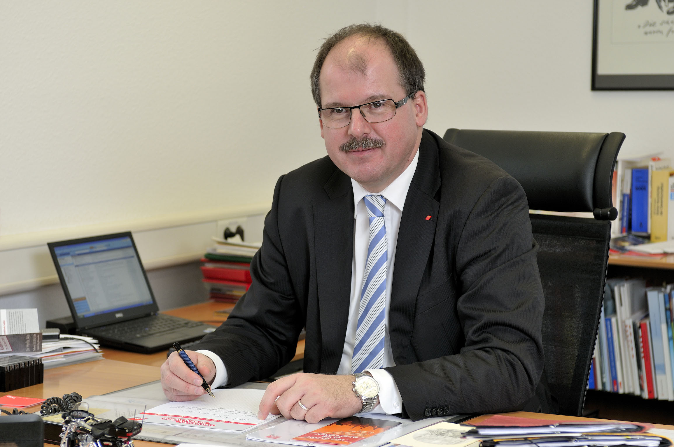 Stefan Koerzell